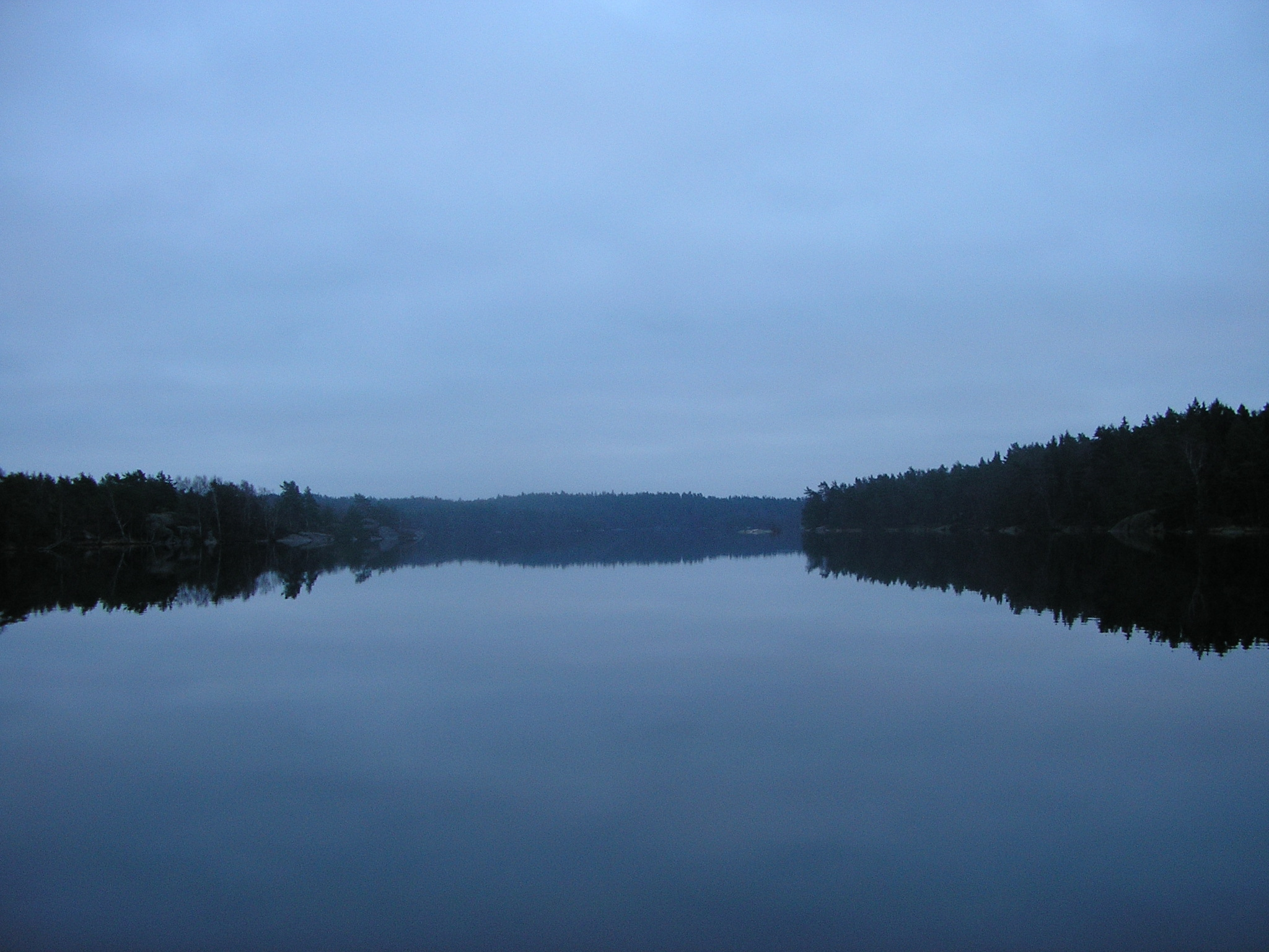 Surtesjön, tagen vid Surtes badplats.